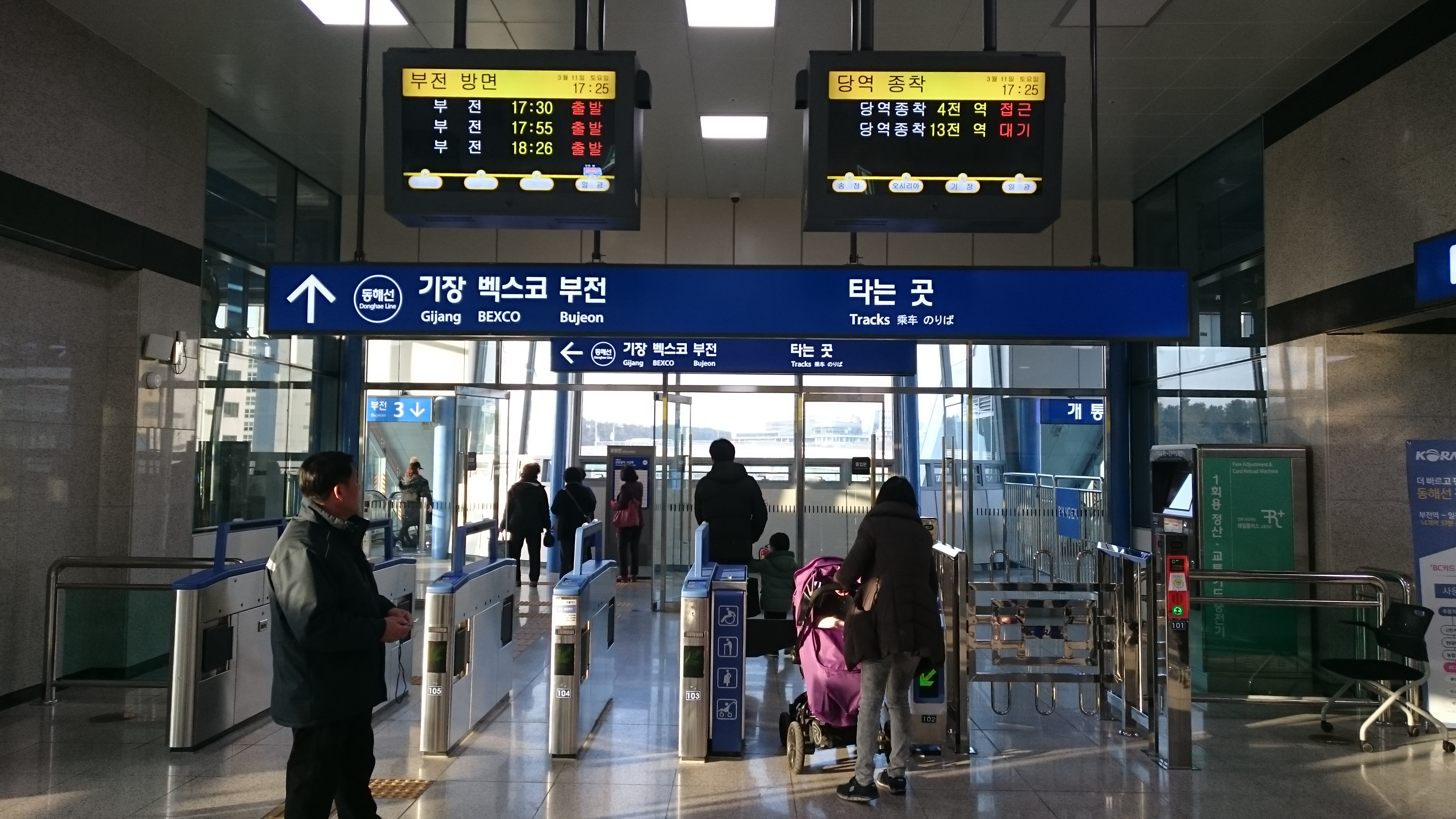 東海線日光駅改札口。